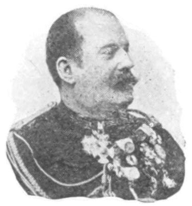 "Napoléon Ney, homme de lettres (1849-1900)".